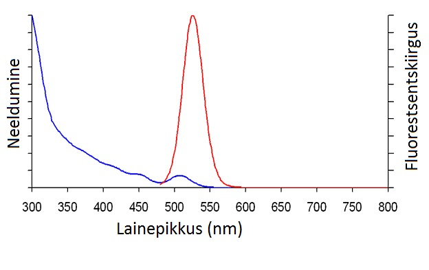 Lihtsustatud fluorestsentsspekter